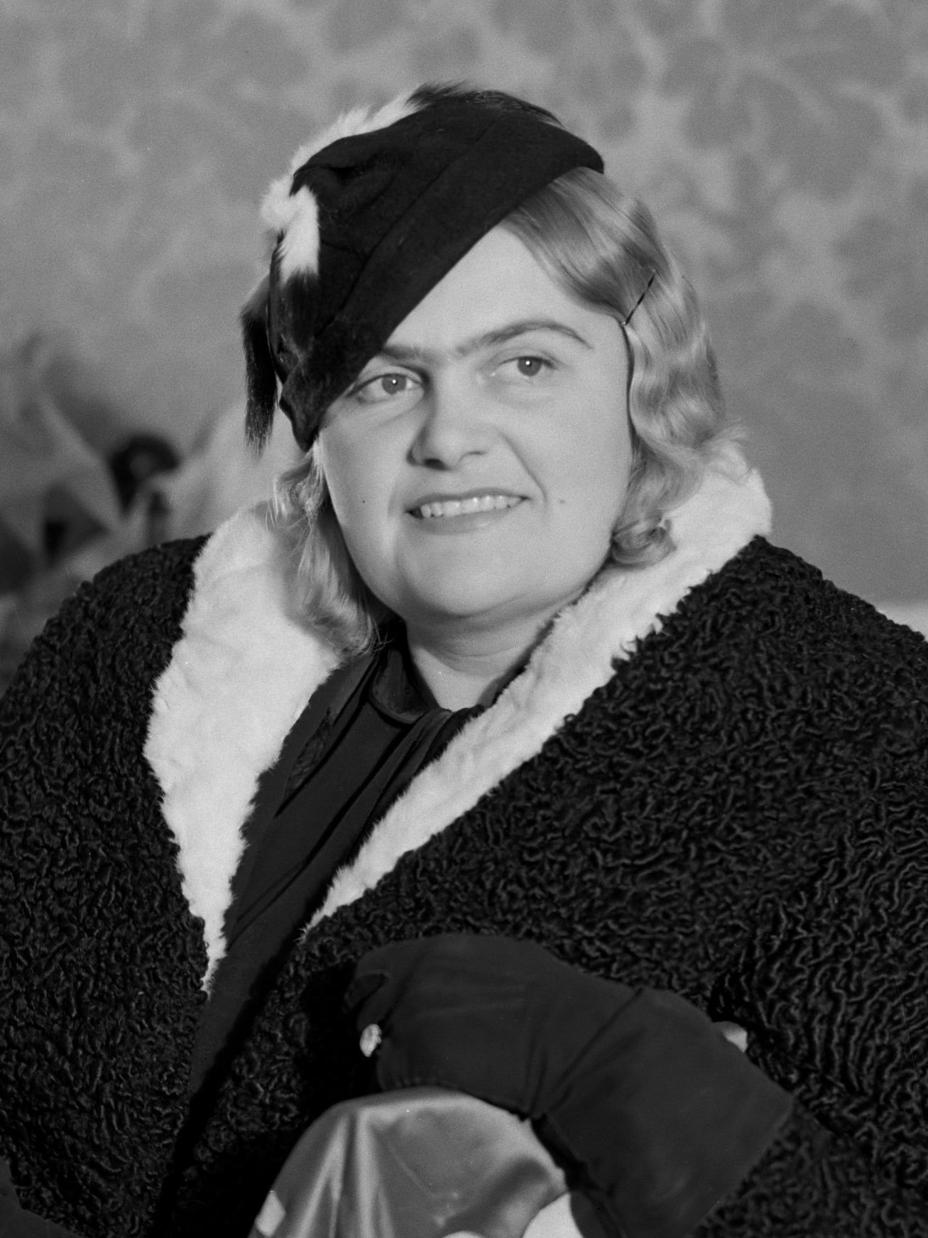 Sopraan Wanda Werminska in haar kleedkamer in Teatr Wielki 1934